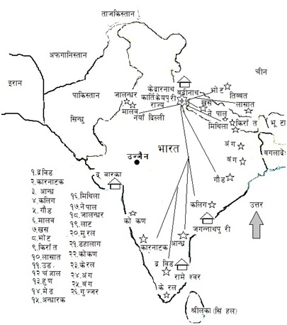 नेपाल भाषा: Katyuri Kingdom